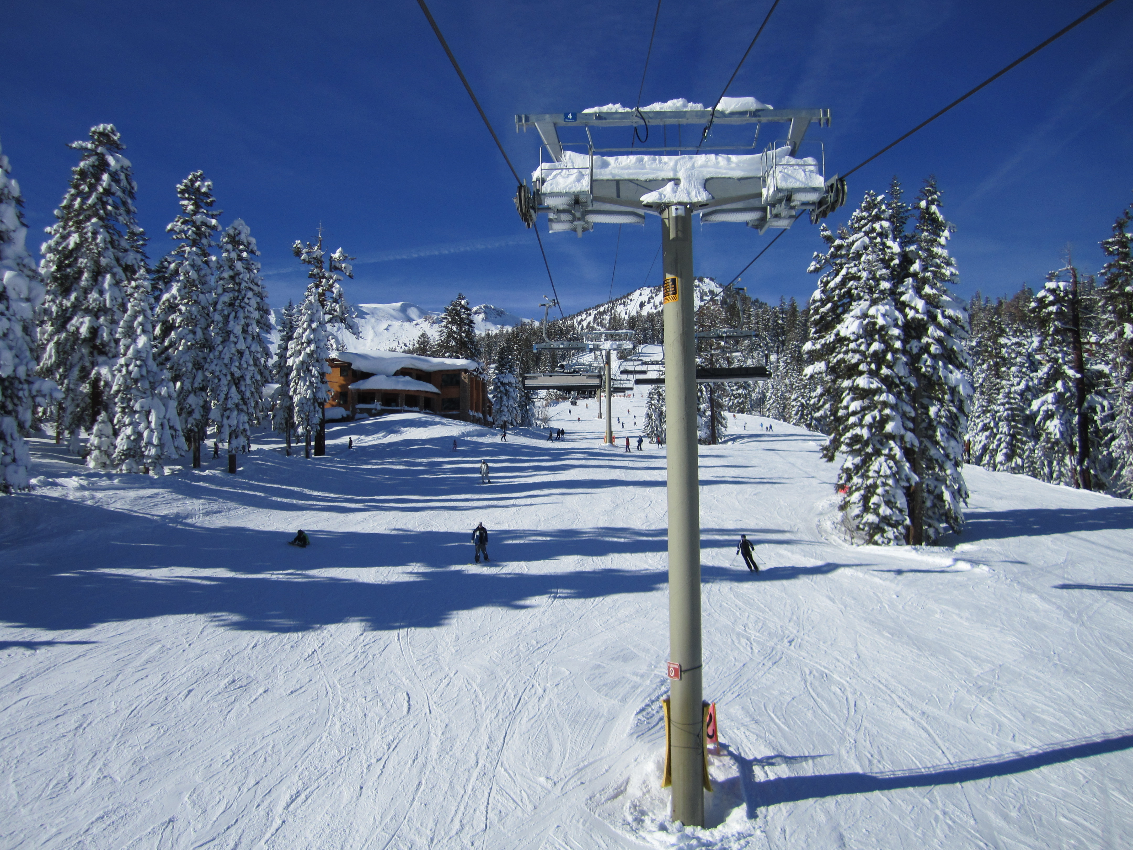 Ein Blick aus dem Eagle Express Skilift am Mammoth Mountain.